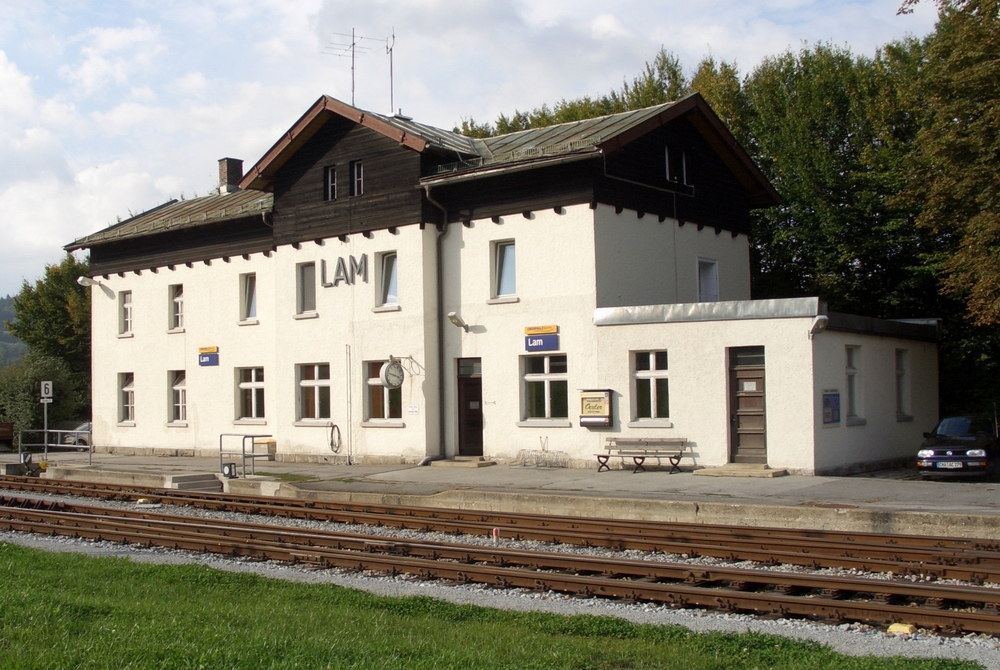 ehemaliger Bahnhof in Lam, Oberpfalz